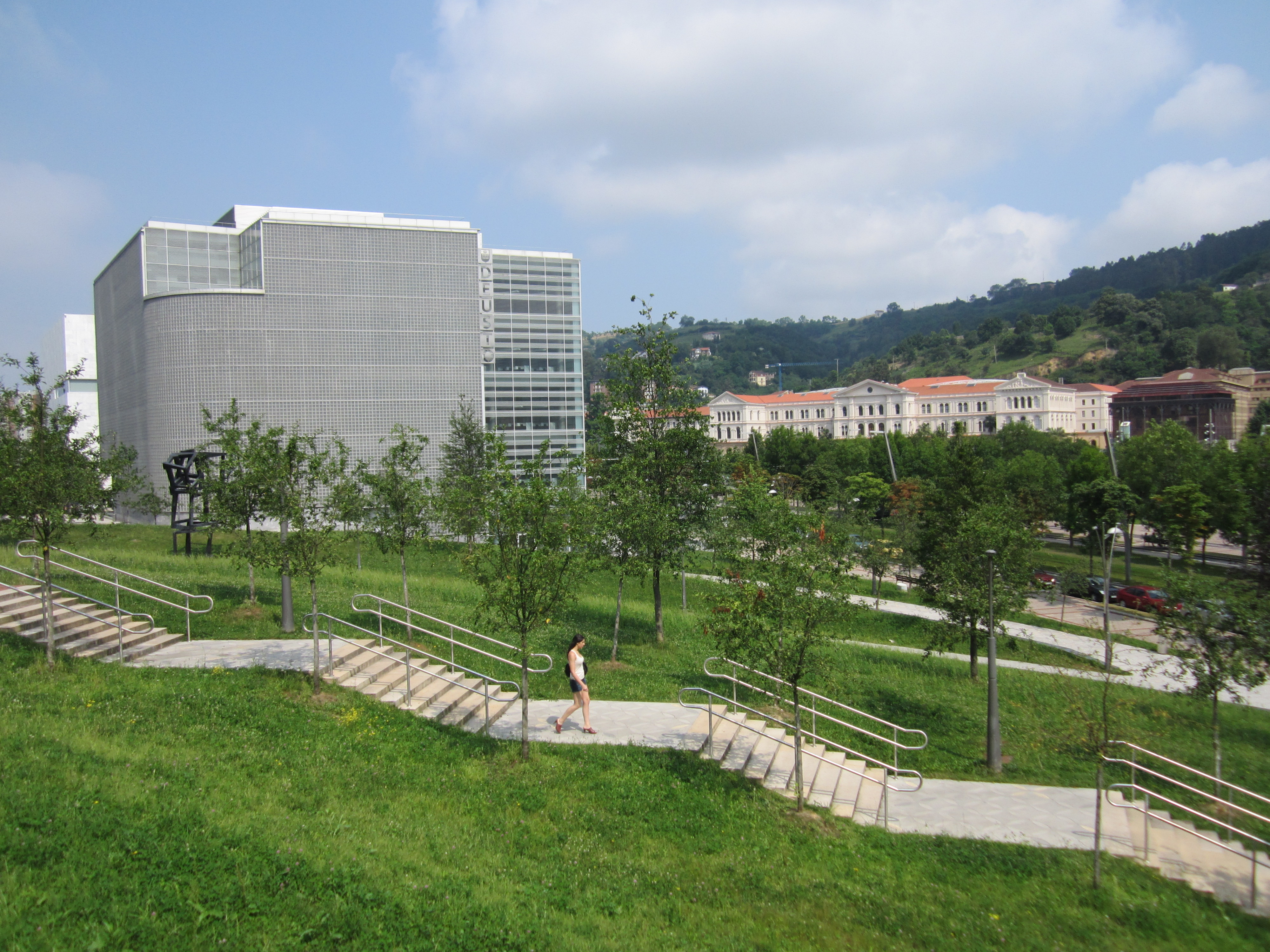 Gorka J. Palaziok egindako argazkia. CC by-sa lizentziapean